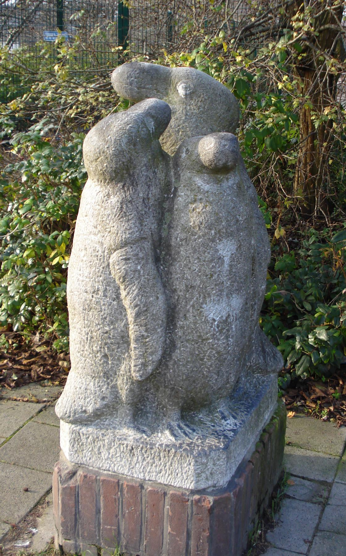 Vlaardingen, van Maerlantlaan. Kunstwerk "Pinguïns" van Lajos Ratkai. Vlaardingen/The Netherlands.